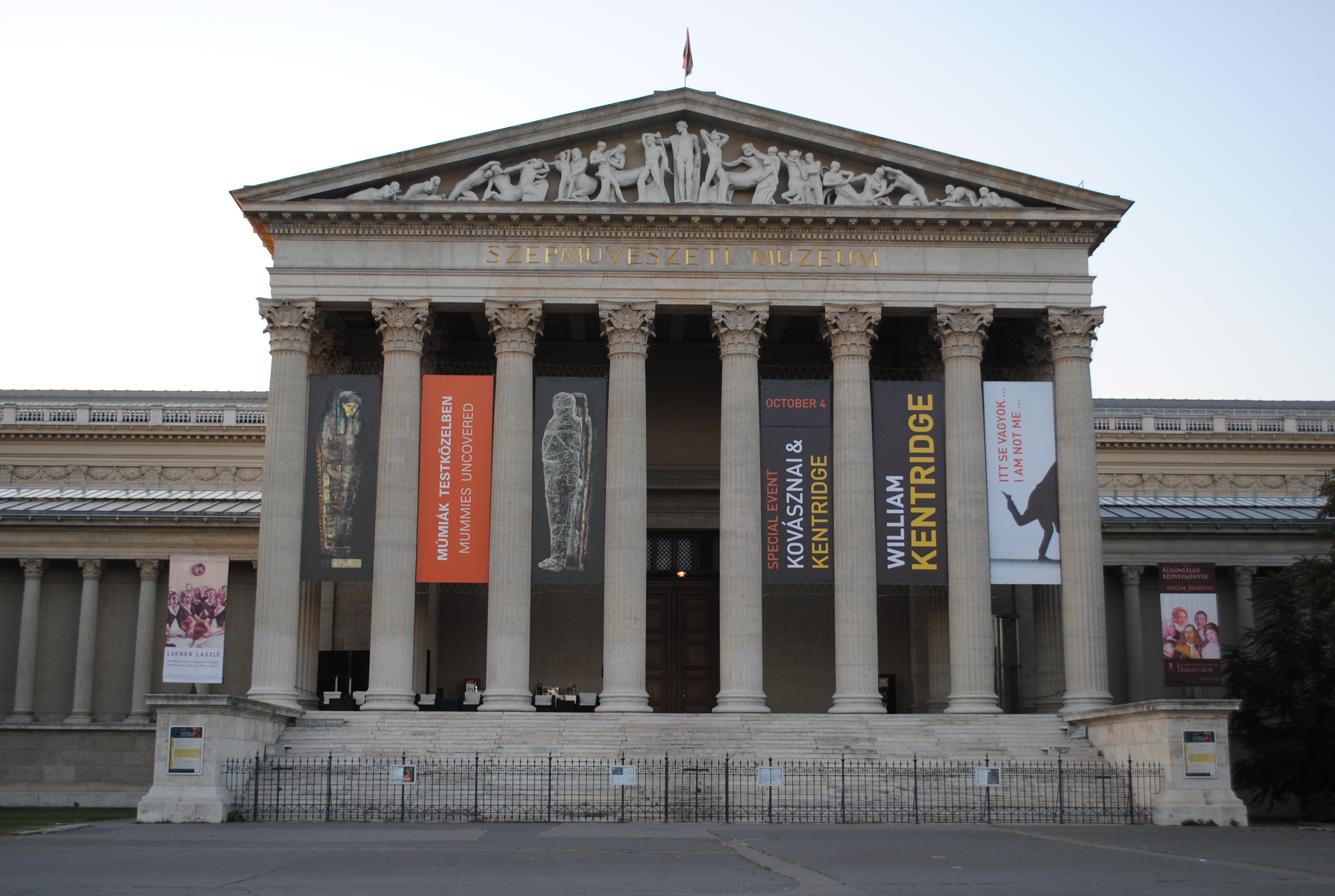 Szépművészeti Múzeum (Budapest 14, Hősök tere, Dózsa György út 39-41., Állatkerti út) This is a photo of a monument in Hungary. Identifier: 1226